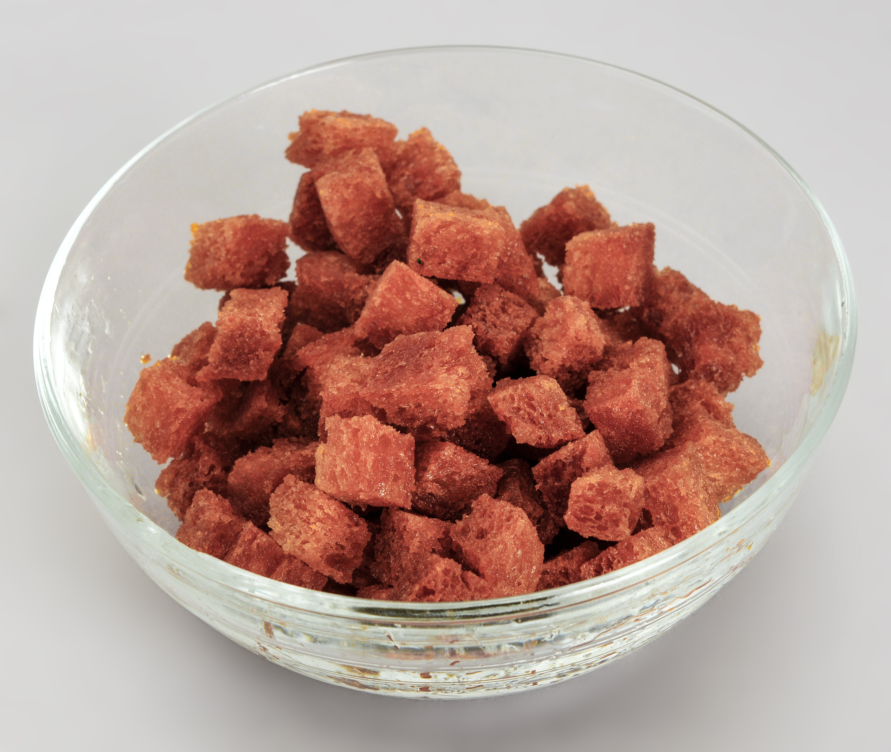 Treffen der Redaktion Essen und Trinken ion Wien